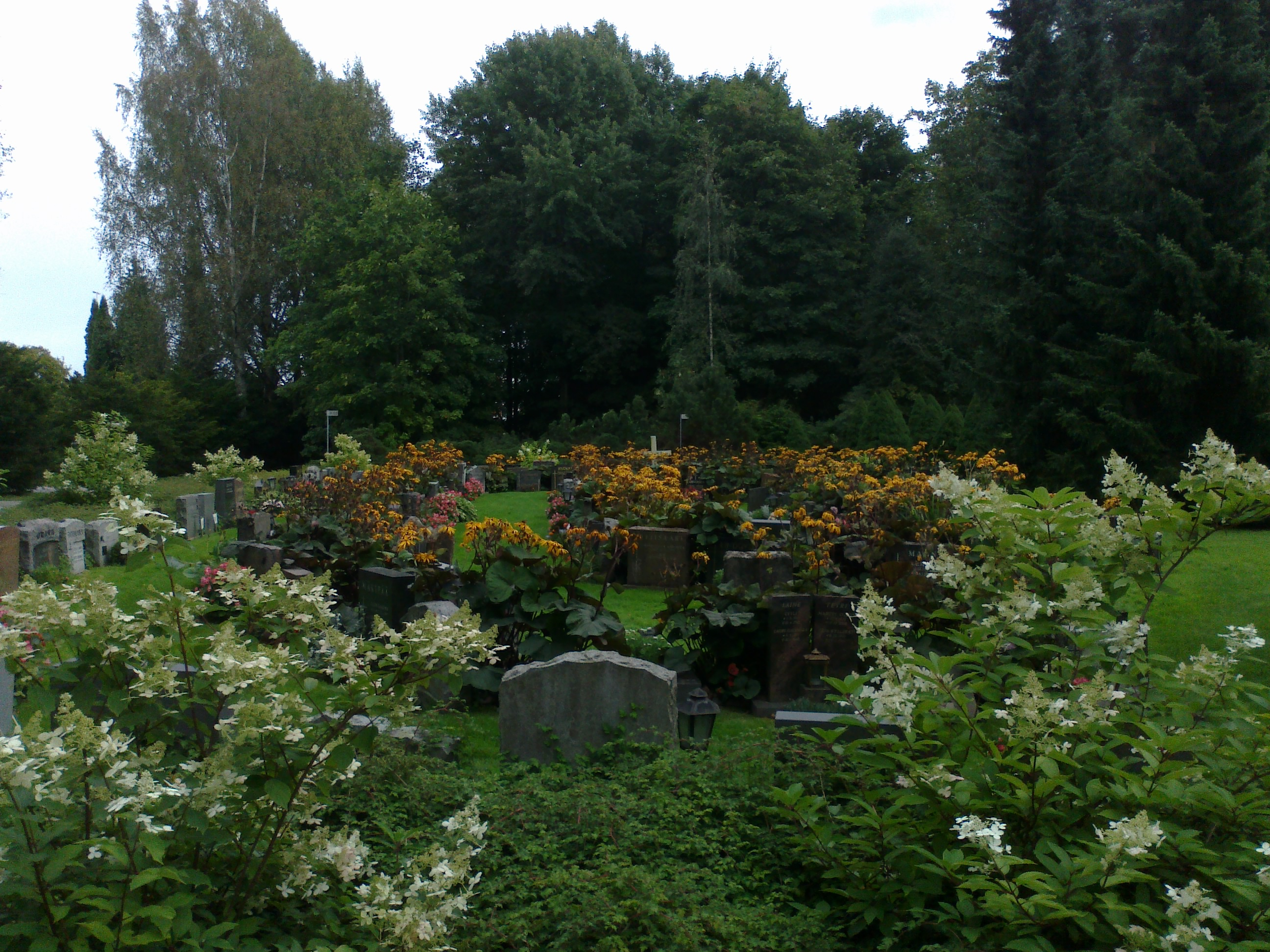 Malmin hautausmaa Helsinki.